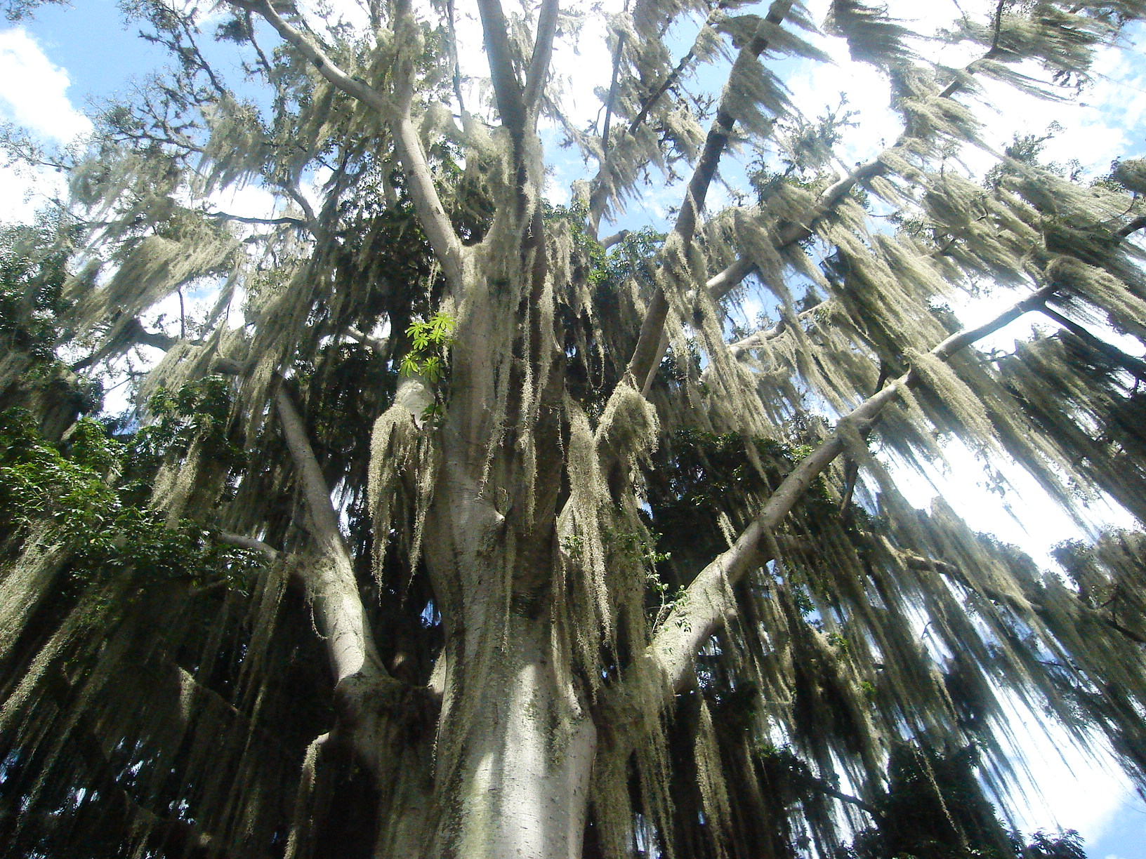 Musgo español sobre una ceiba del Parque Natural el Gallineral (San Gil, Colombia).